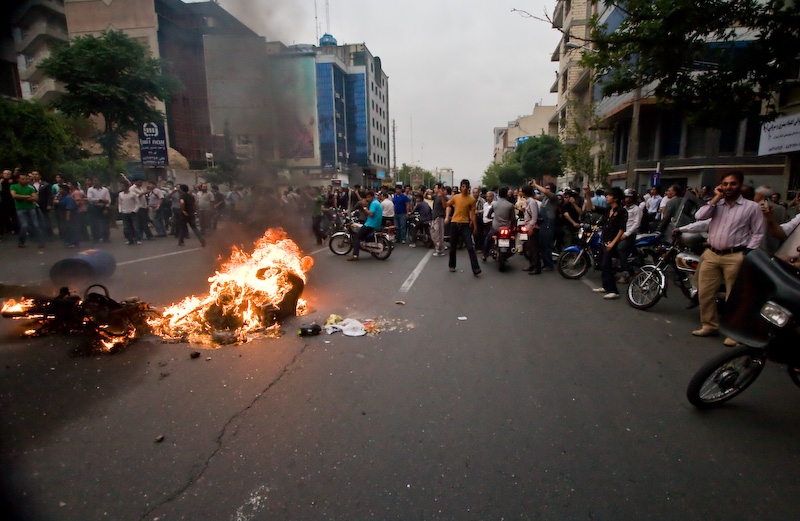 Protesters in Tehran